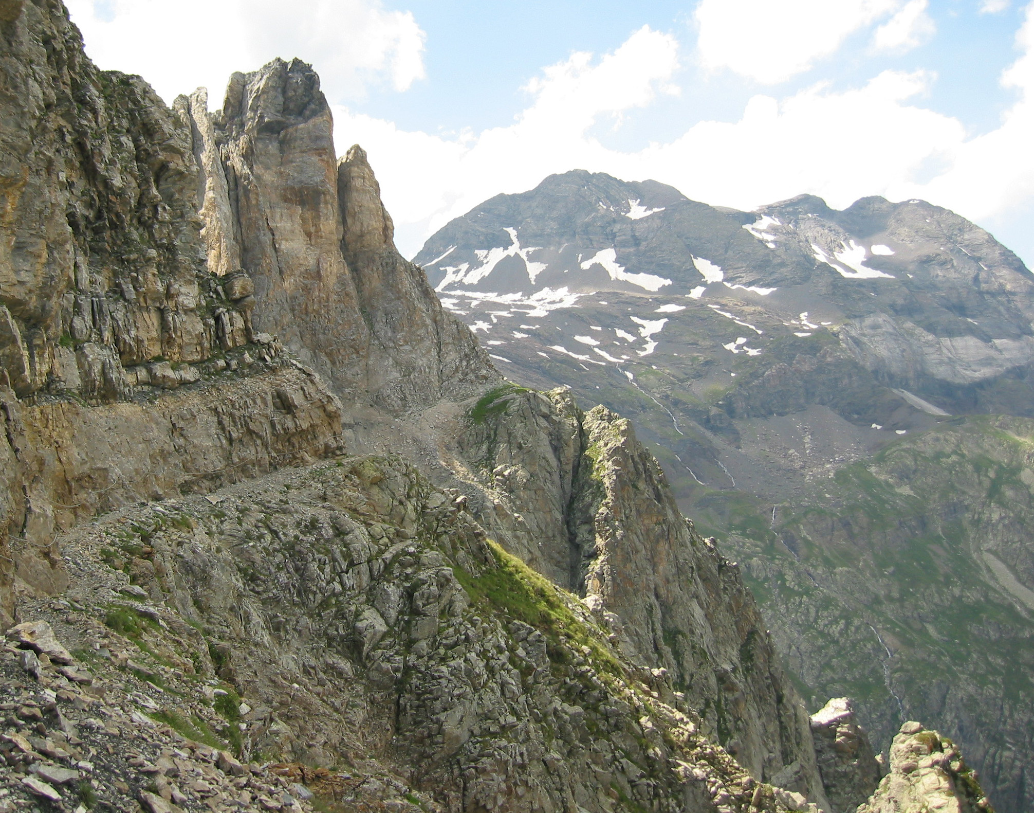 Falaise sud du cirque de Barrosa vue du col d'Espluca Ruego : aiguilles de calcaire dévonien en haut, appartenant à la nappe de charriage de Gavarnie, éperons granitiques en bas, appartenant au socle et supportant la corniche du chemin des mines ; à droite, vue sur le pic de La Munia.